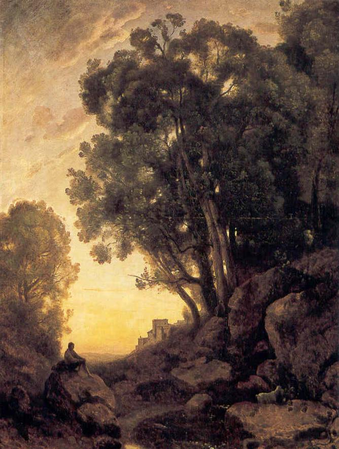 Olasz pásztor (Le chevrier italienne)